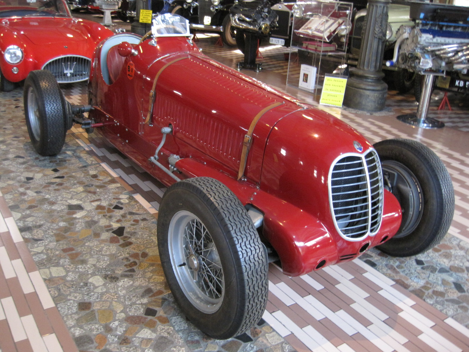 Automobiles in Panini Maserati Museum in Modène